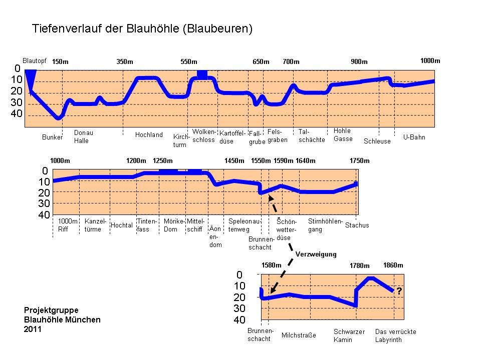 Tiefenprofil der Blauhöhle vom Quelltopf bis zum Forschungsendpunkt im Stirnhöhlengang 16.09.2008